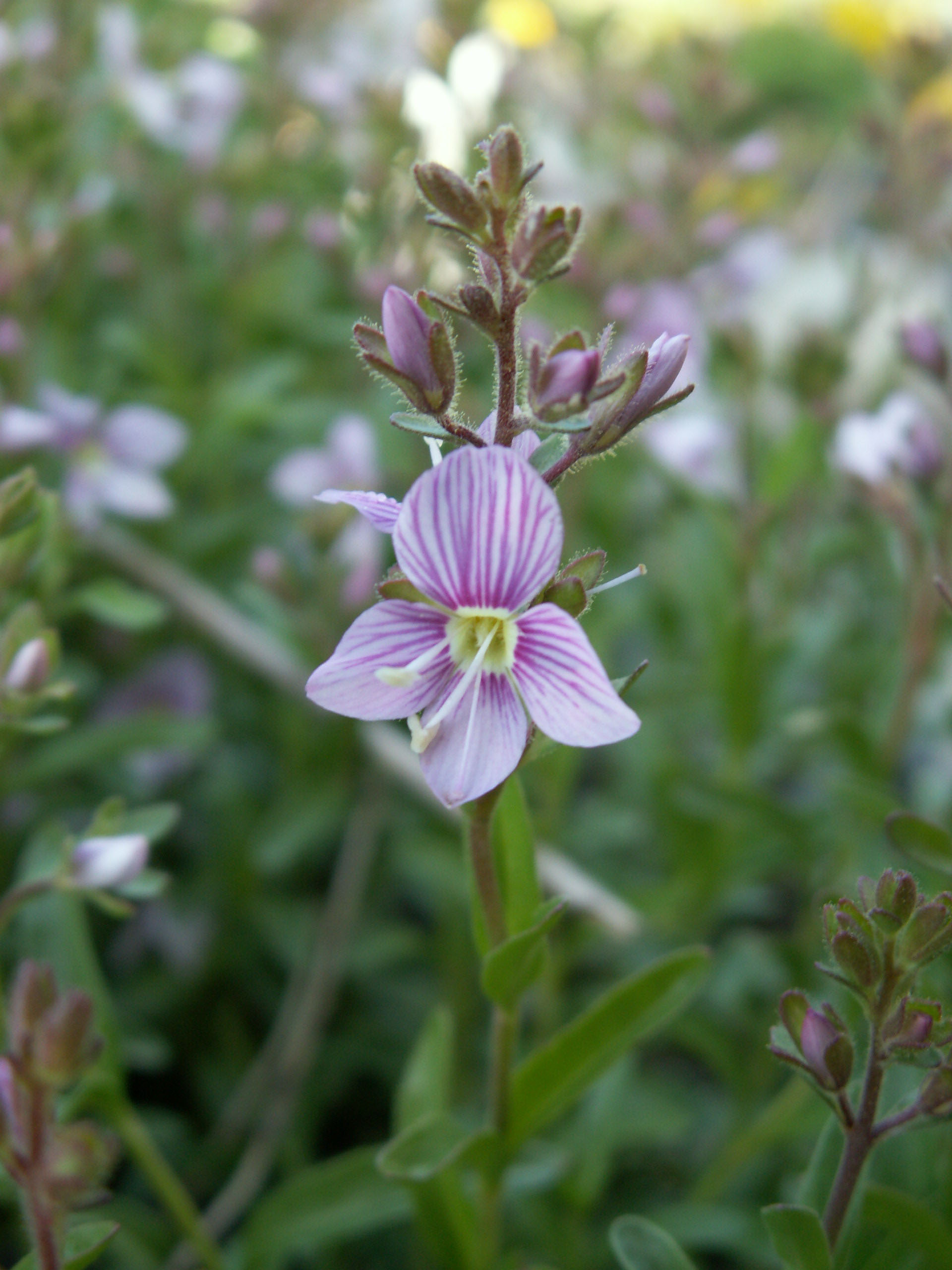 Veronica fruticulosa, Schynige Platte, Kanton Bern, Schweiz